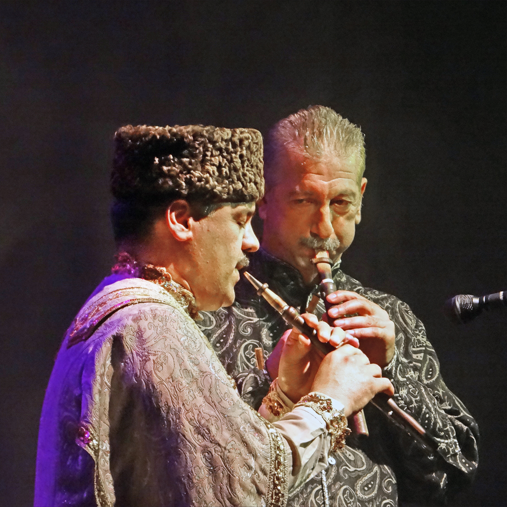 Shirzad Fataliyev (mélodie) à gauche et Shohrat Aliyev (bourdon) jouant des hautbois balaban (duduk pour les arméniens) Article de Wikipedia sur le balaban: Concert Les bardes ashiq du Azerbaïdjan dans le cadre du festival Les Orientales Musiques et traditions d'Orient Saint-Florent-le-Vieil